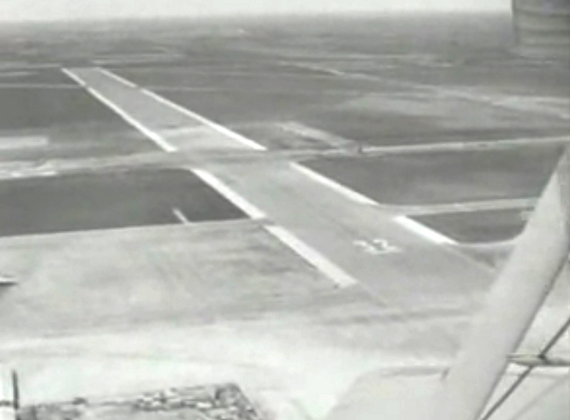 Startbaan 32-14 op Schiphol. Screencap uit filmpje tgv 50 jarig bestaan van de luchthaven